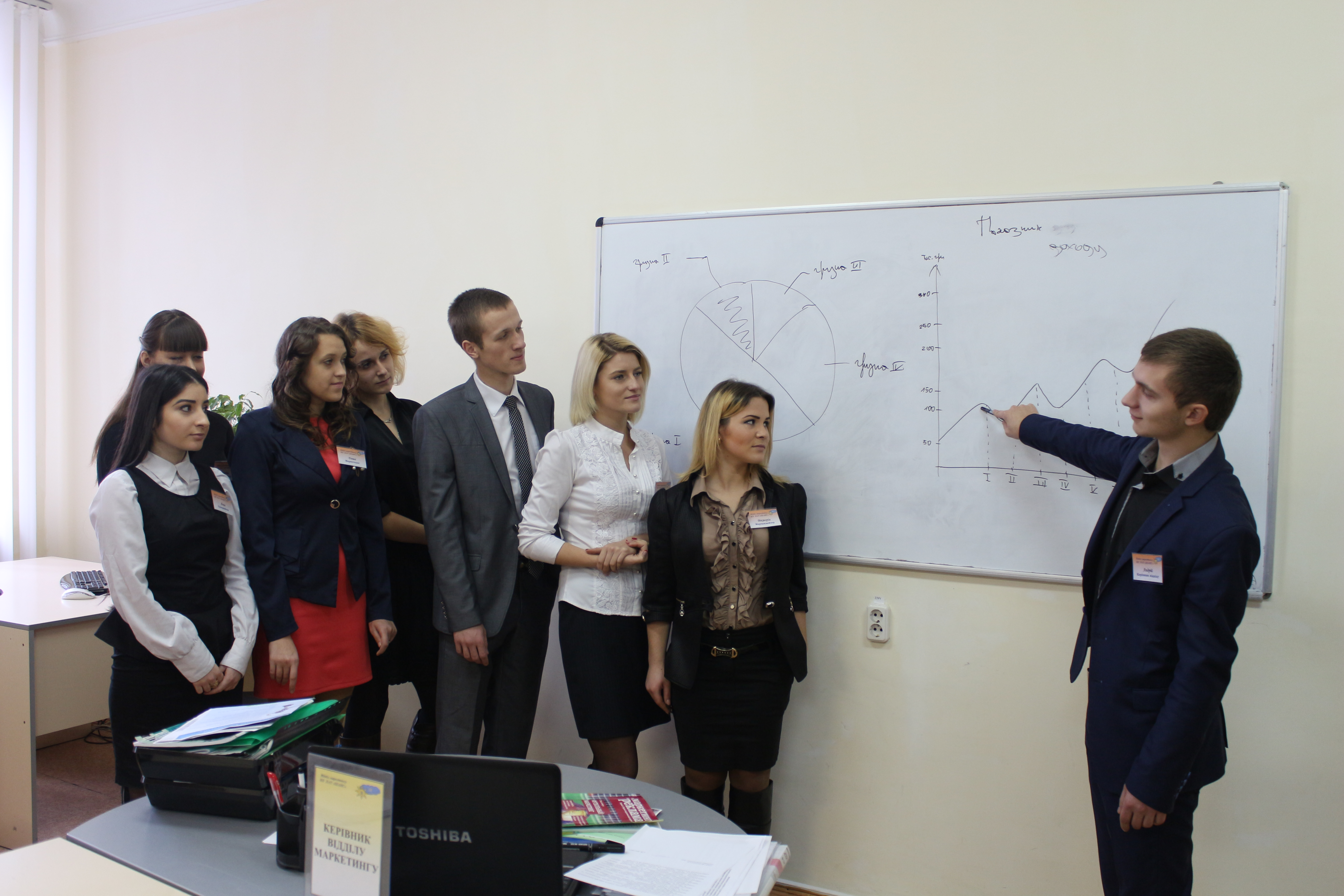 Департамент маркетингу навчального підприємства ПАТ "Шанс".